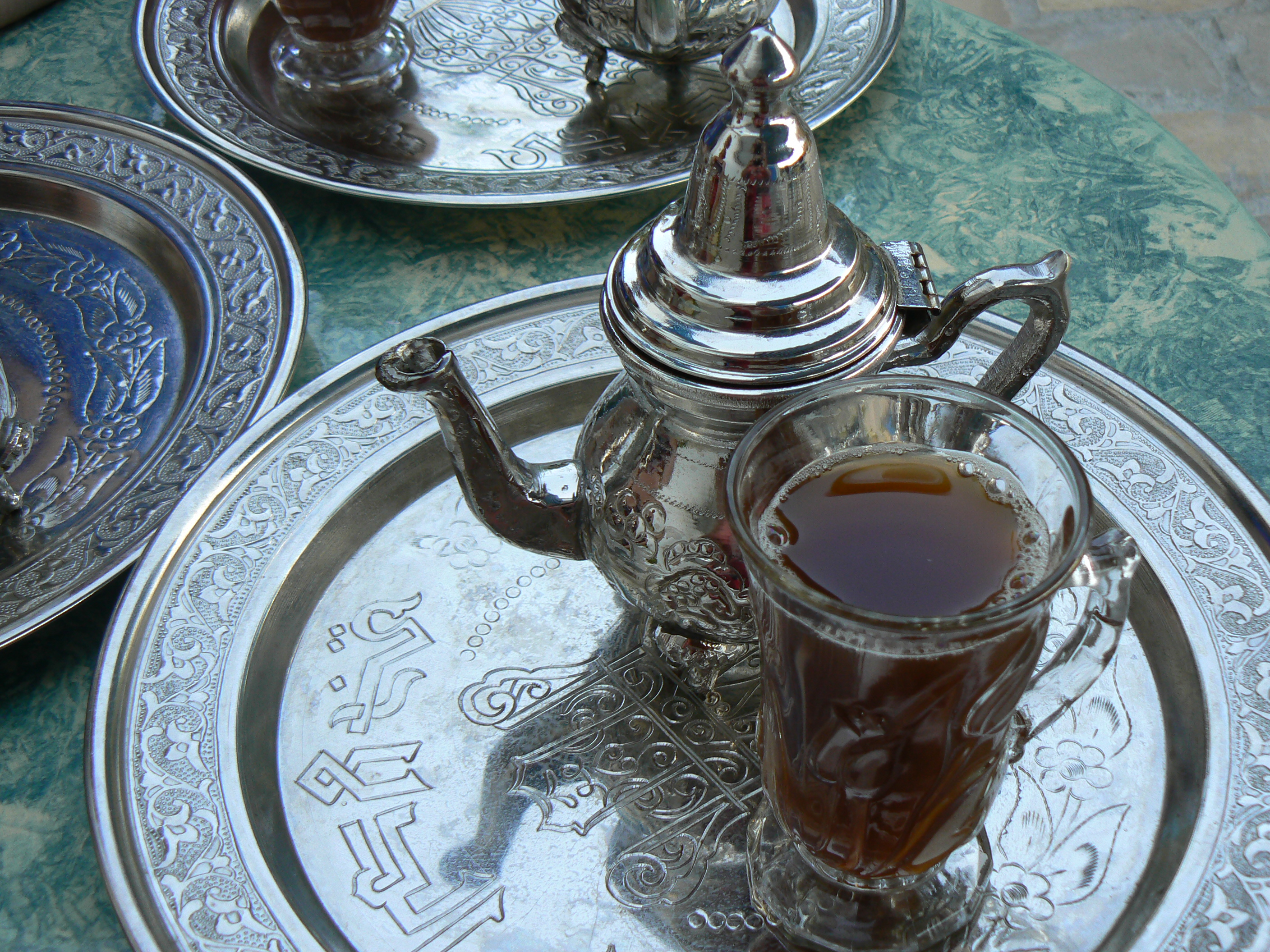 thé à la menthe (sans pignons)